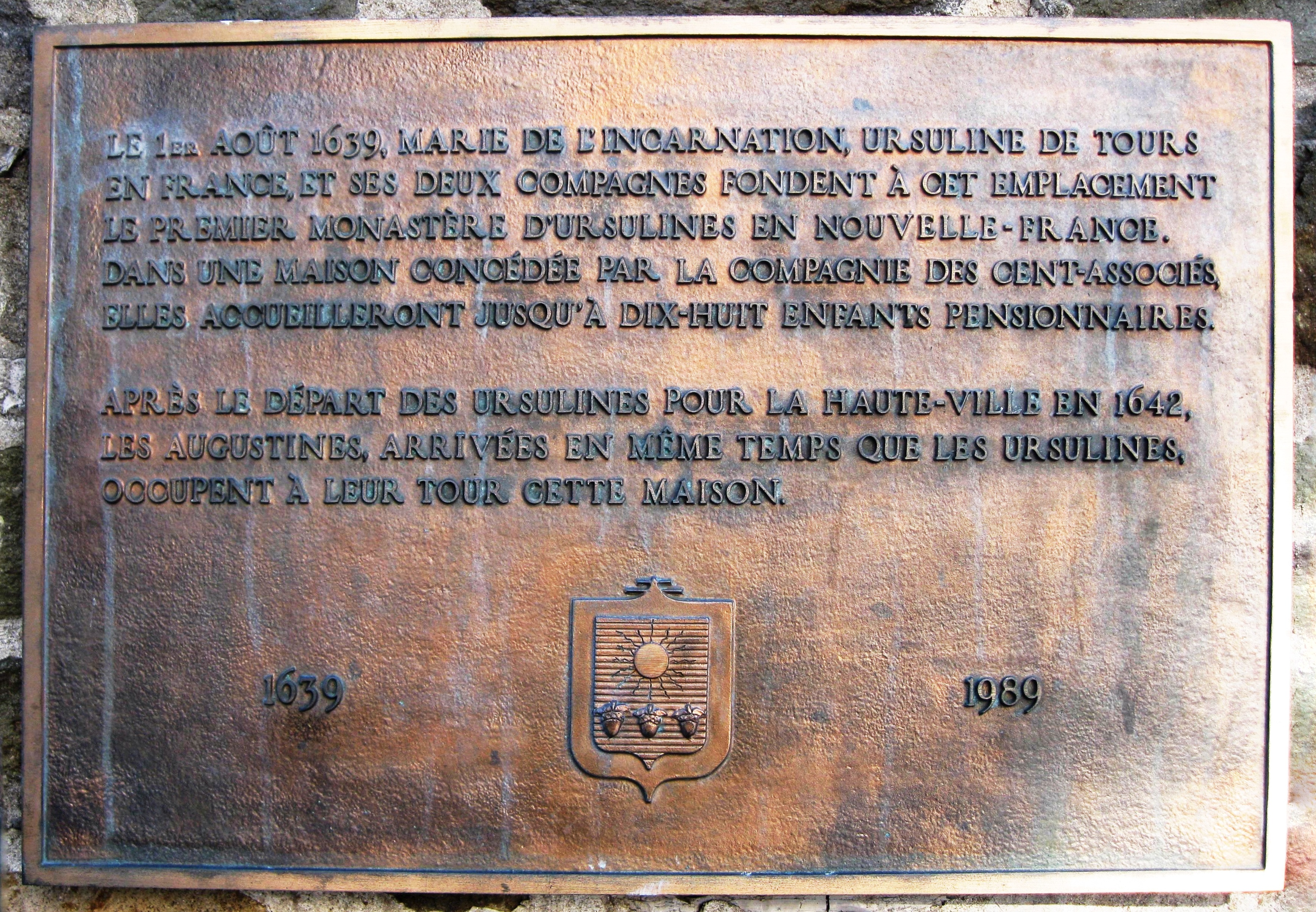 Plaque de la fondation du premier monastère des Ursulines en Nouvelle-France, Place Royale dans la Basse-Ville du Vieux-Québec. Texte de la plaque: Le 1er août 1639, Marie de l'Incarnation, ursuline de Tours en France et ses deux compagnes fondent à cet emplacement le premier monastère d'Ursulines en Nouvelle-France. Dans une maison concédée par la Compagnie des Cent-Associés, elles accueillent jusqu'à dix-huit enfants pensionnaires.Après le départ des Ursulines pour la Haute-Ville en 1642, les Augustines, arrivées en même temps que les Ursulines, occupent à leur tour cette maison.1639-1989